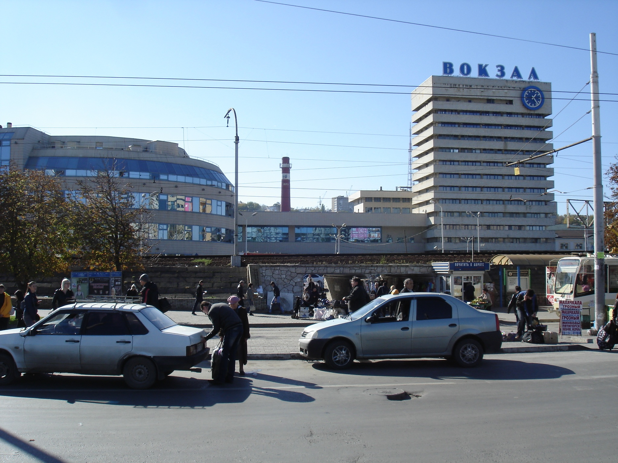 ЖД-вокзал в РНД